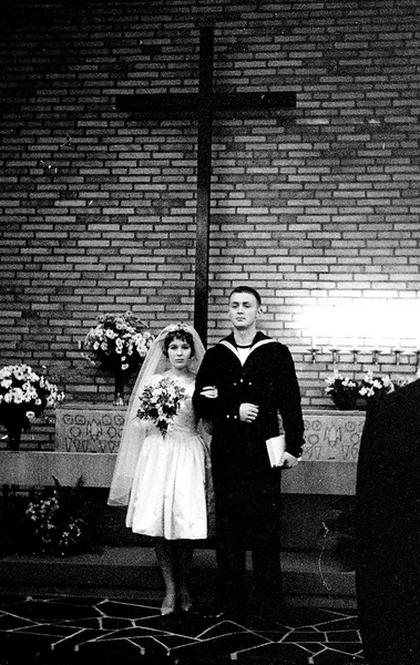 Sirpa ja Jukka Kuoppamäen häät Helsingin Meilahden kirkossa 11. marraskuuta 1962.